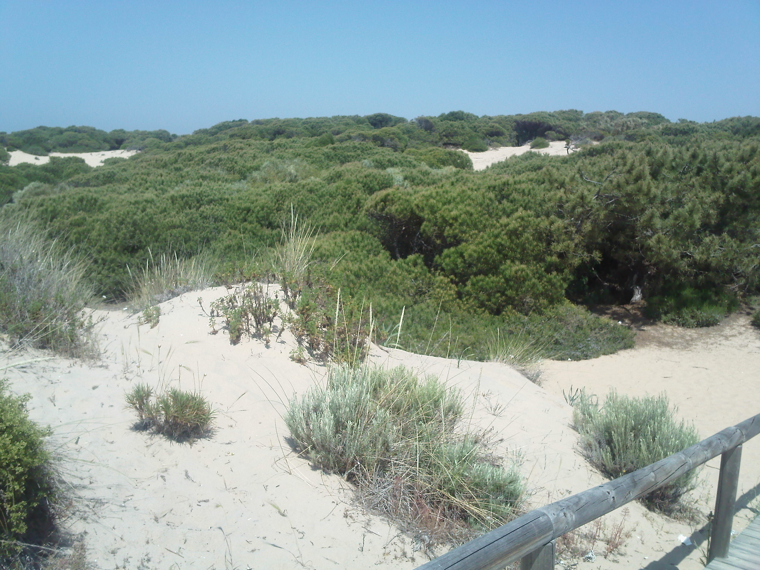 Enebrales de Punta Umbría This is a photography of a Special Area of Conservation in Spain with the ID: ES6150002. Natura2000 entry, EEA entry